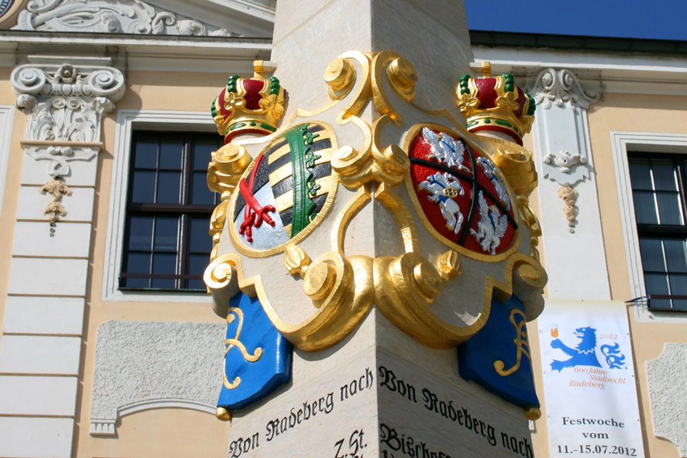 Wappen an der neuen Postmeilensäule auf dem Markt Radeberg